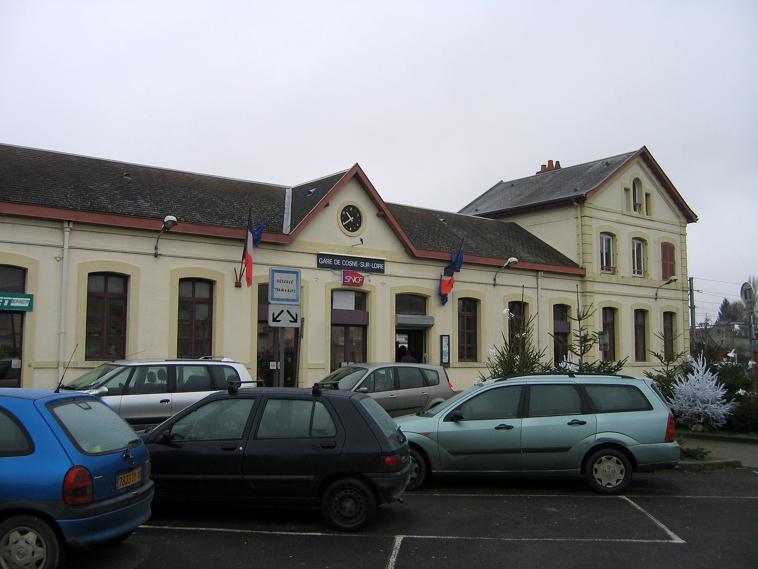 La gare de Cosne sur Loire dans la Nièvre